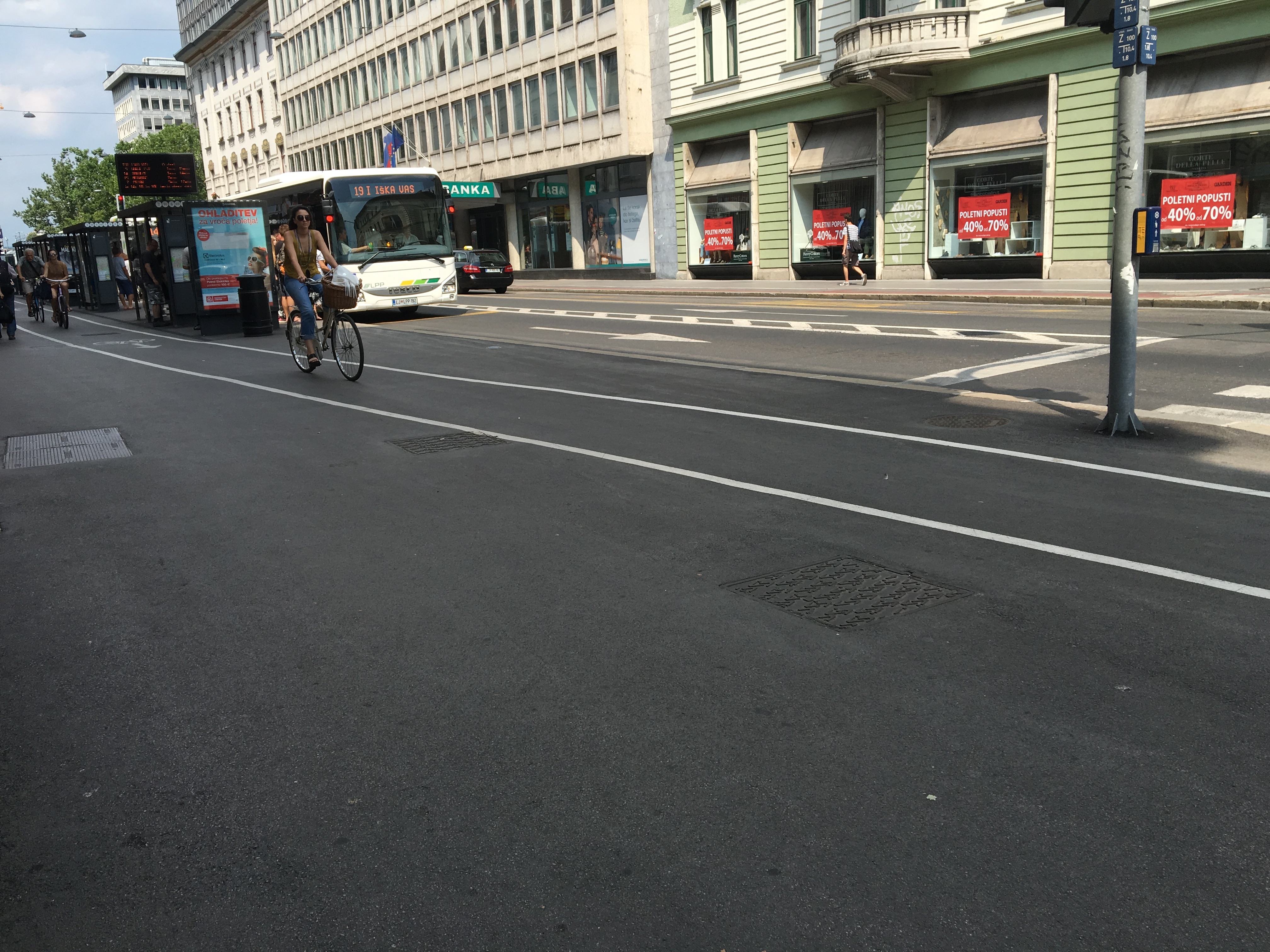 IVECO Crossway LE 12m (LPP 19I) na Bavarskem dvoru